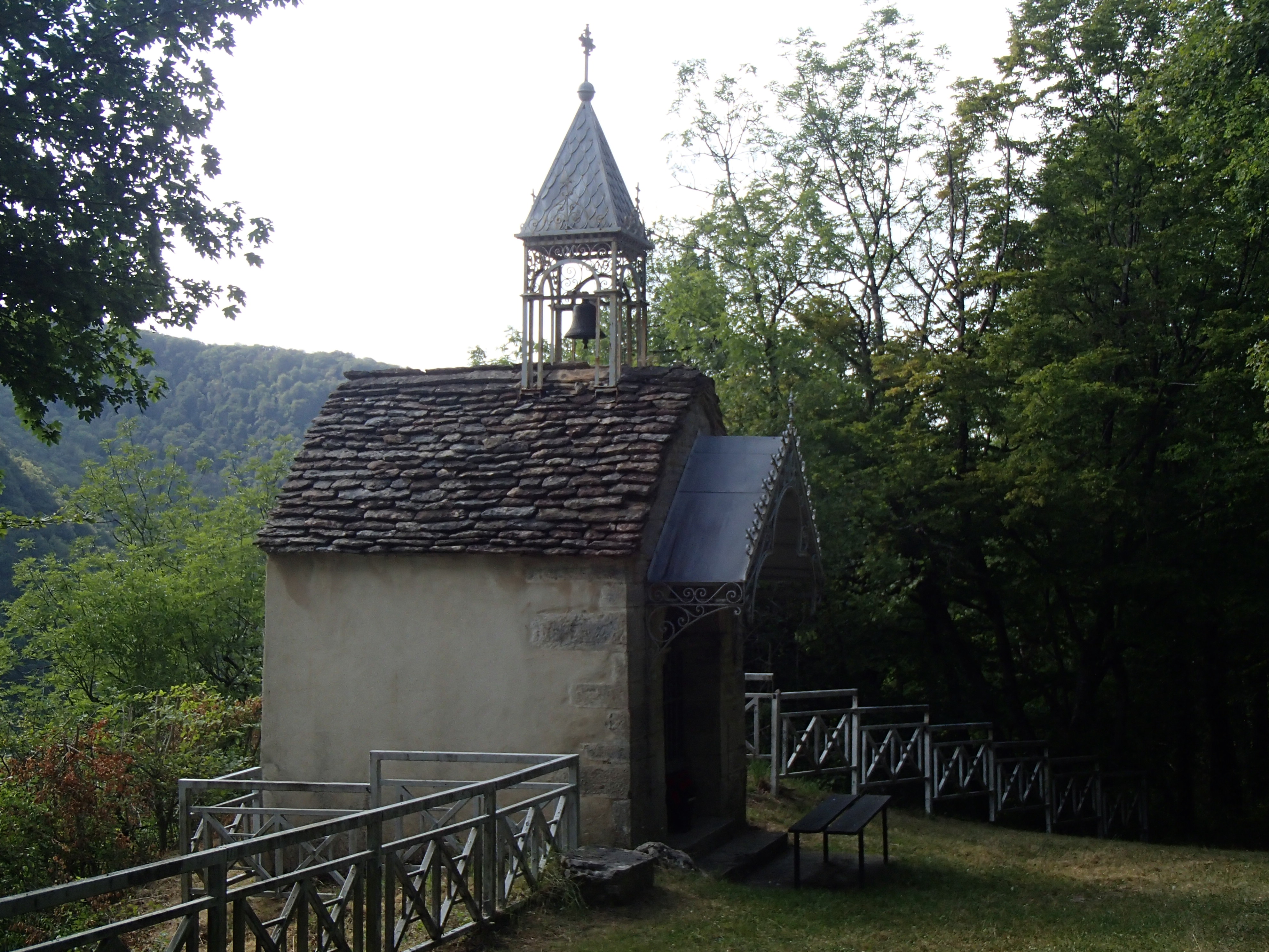 photo prise en 2020